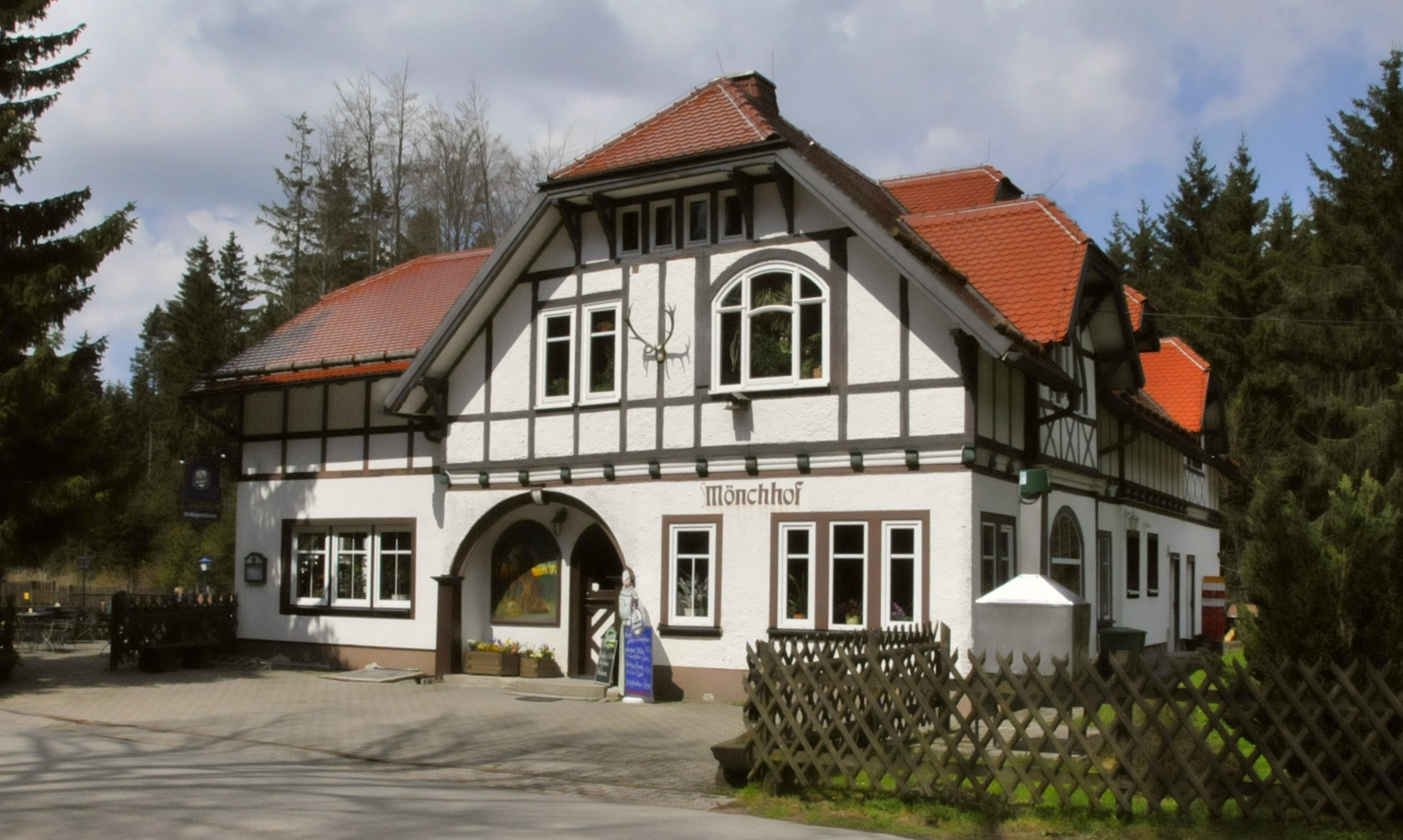 Waldgasthof Mönchhof in Thüringen